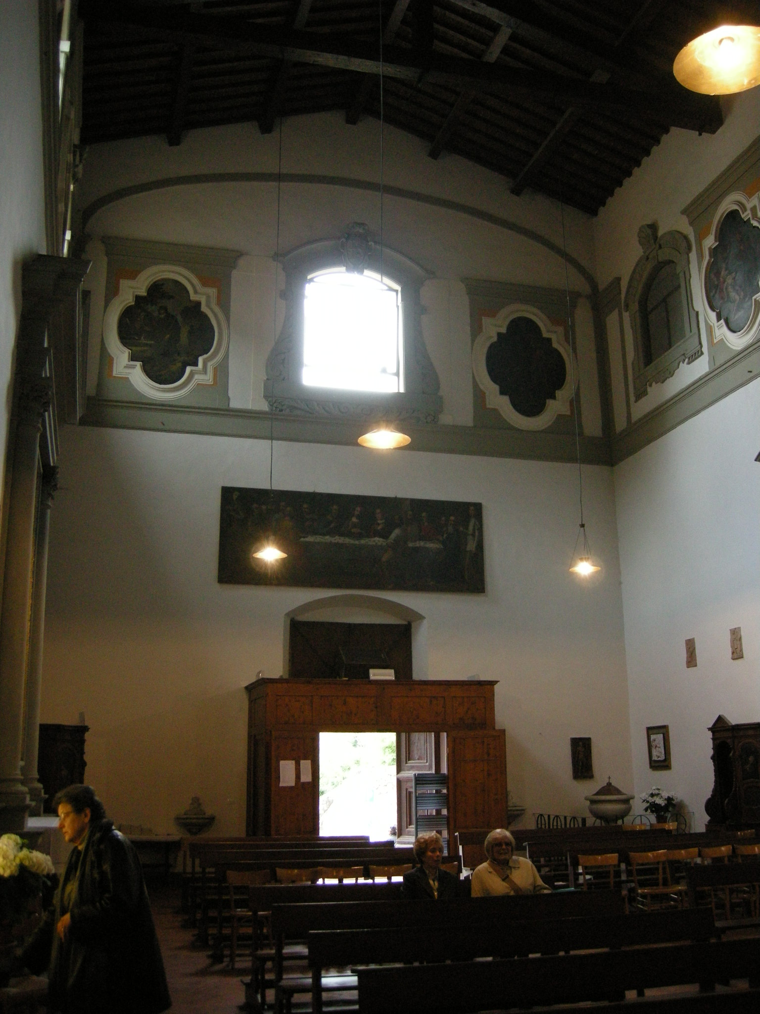 San francesco di paola (florence), interno